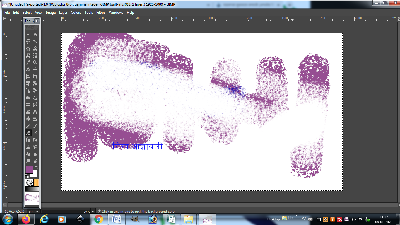 गिम्प-साफसफाई साधन